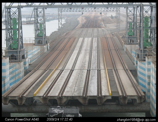 粤海铁路大陆最南端 200802